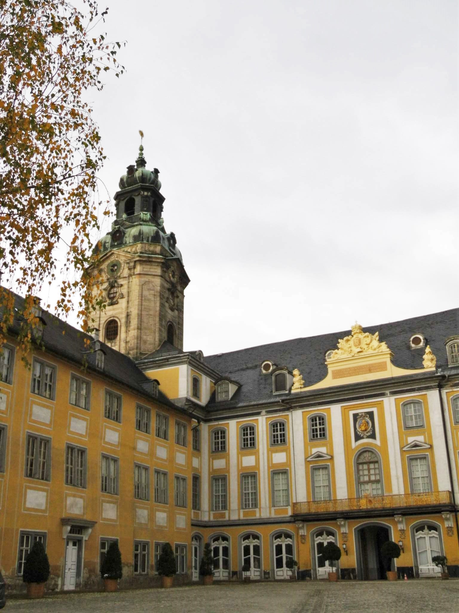 Burghof der Heidecksburg Rudolstadt